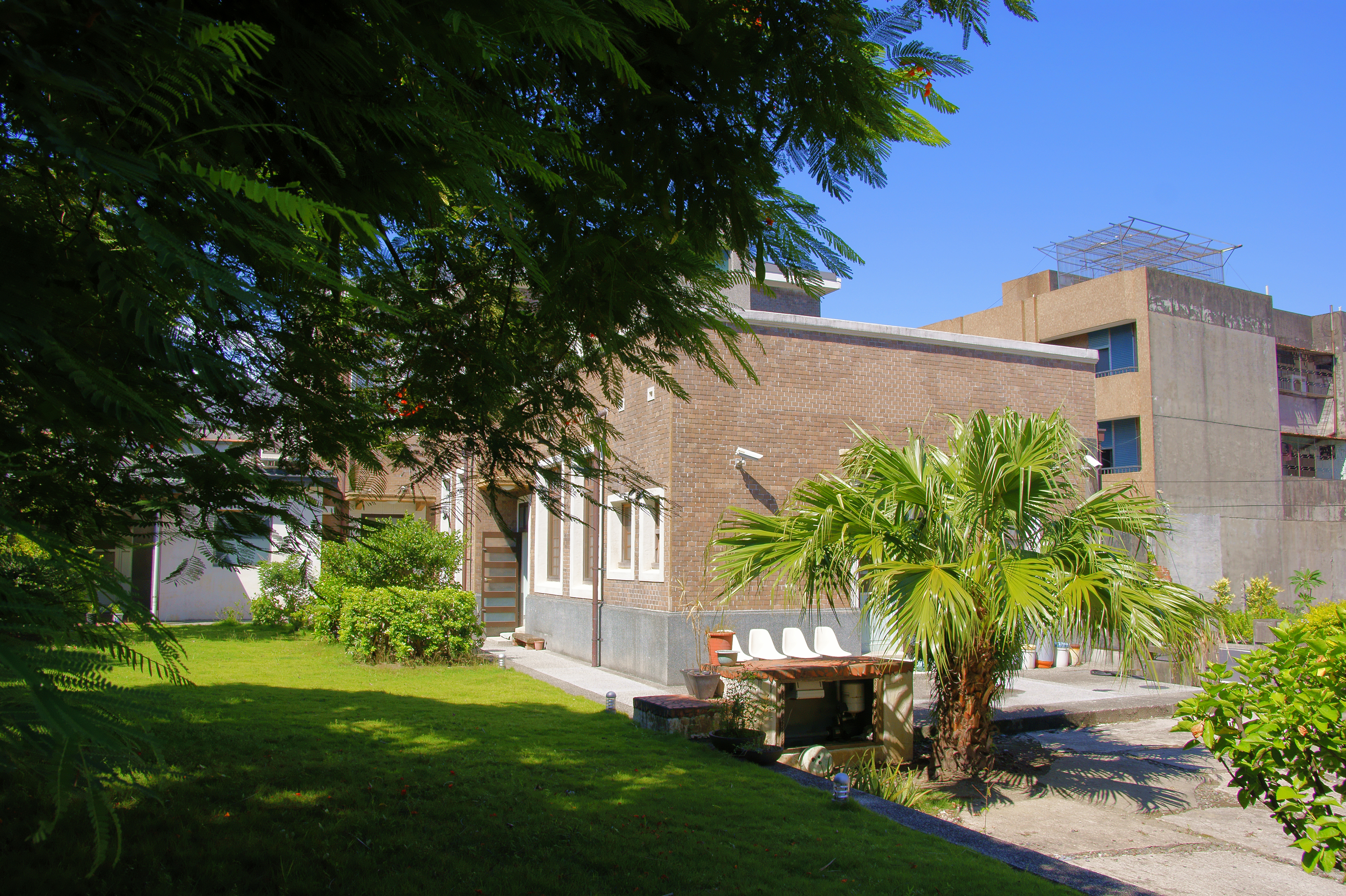 整修完成的利生醫院，看起來煥然一新，也是動物聚集的場所，不論家貓、鴿子、甚至有時後還能看到樹鵲